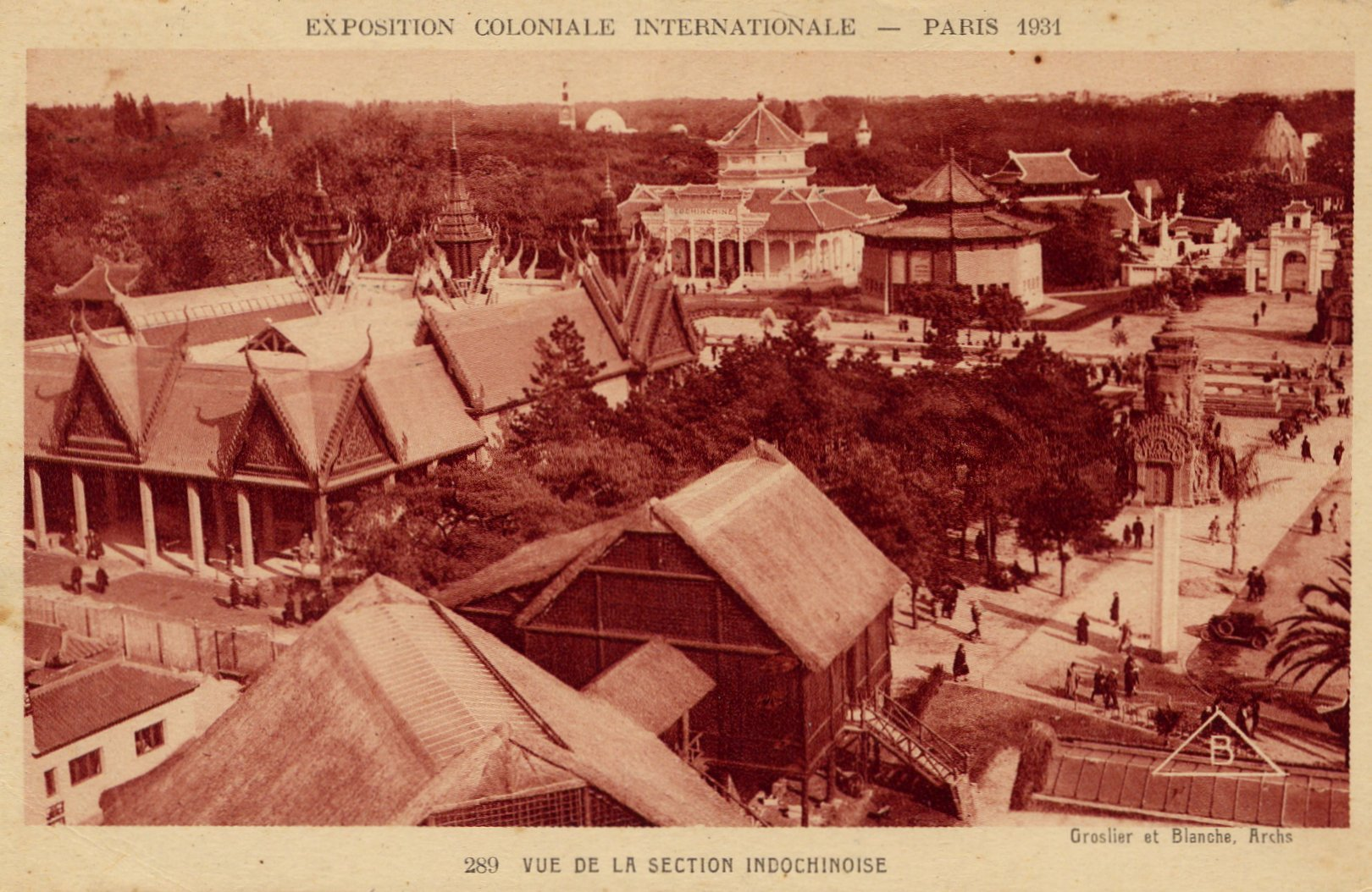 Vue générale de la section indochinoise à l'Exposition Coloniale de PARIS en 1931